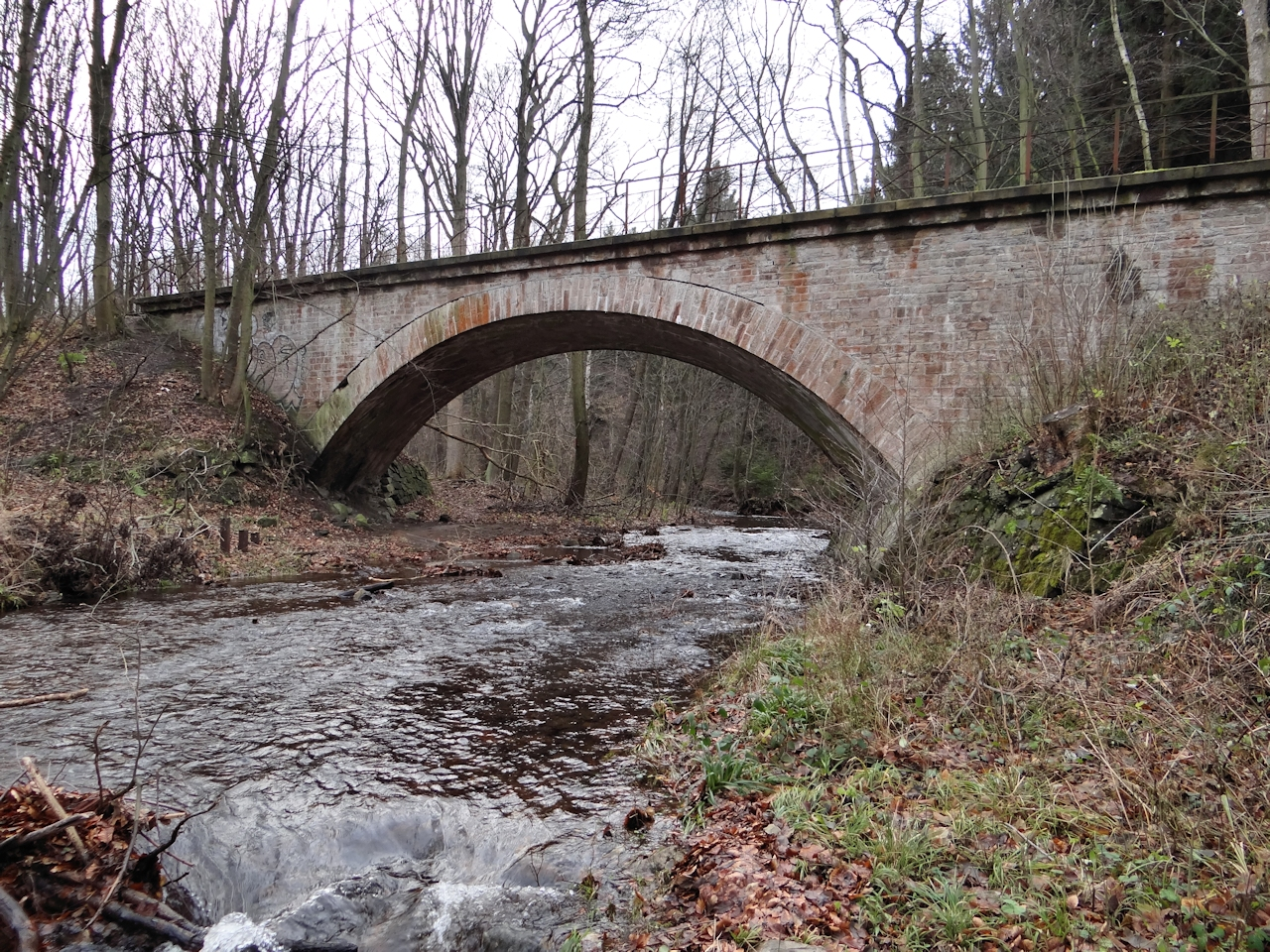 Eisenbahnbrücke der ehemaligen Linie Bad Harzburg-Ilsenburg über die Ecker bei Stapelburg/Eckertal